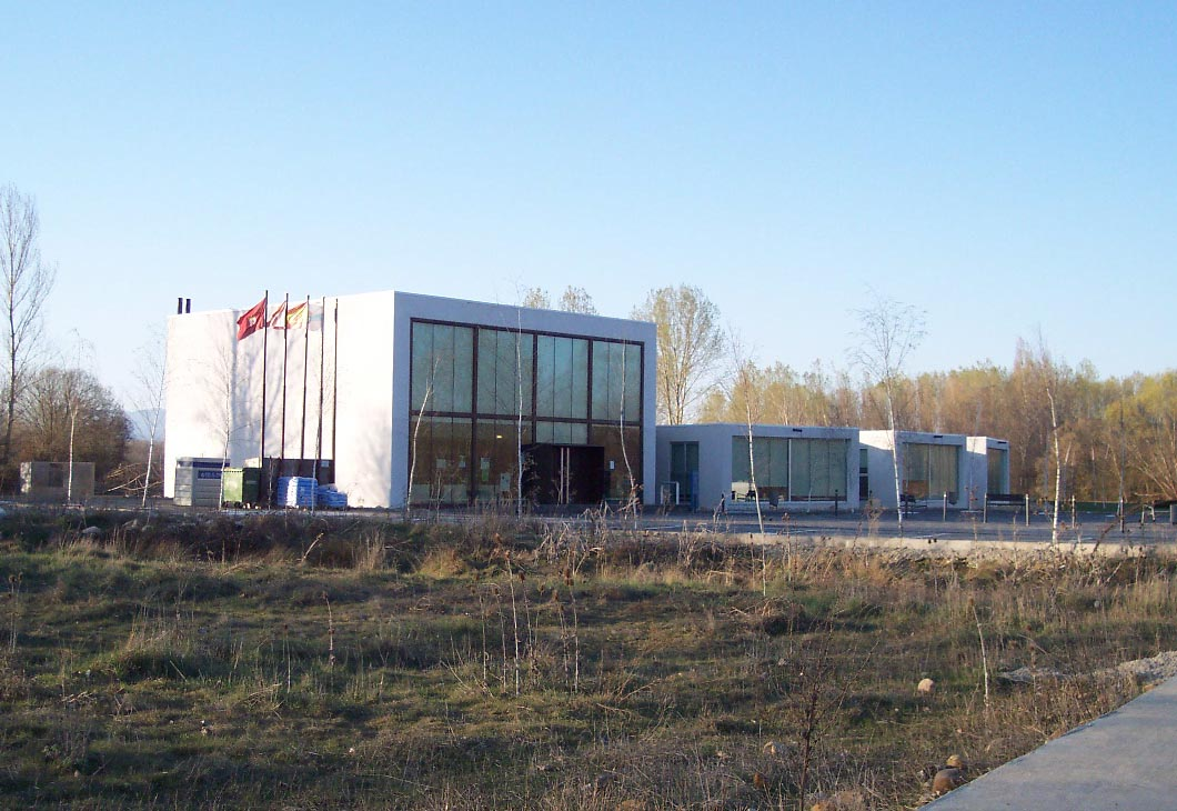 Vista del nuevo edificio del Ayuntamiento de Sariegos (León)